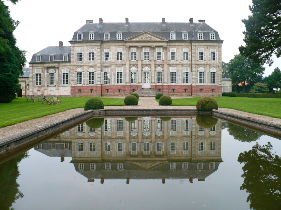 Château de Varlemont à Barly